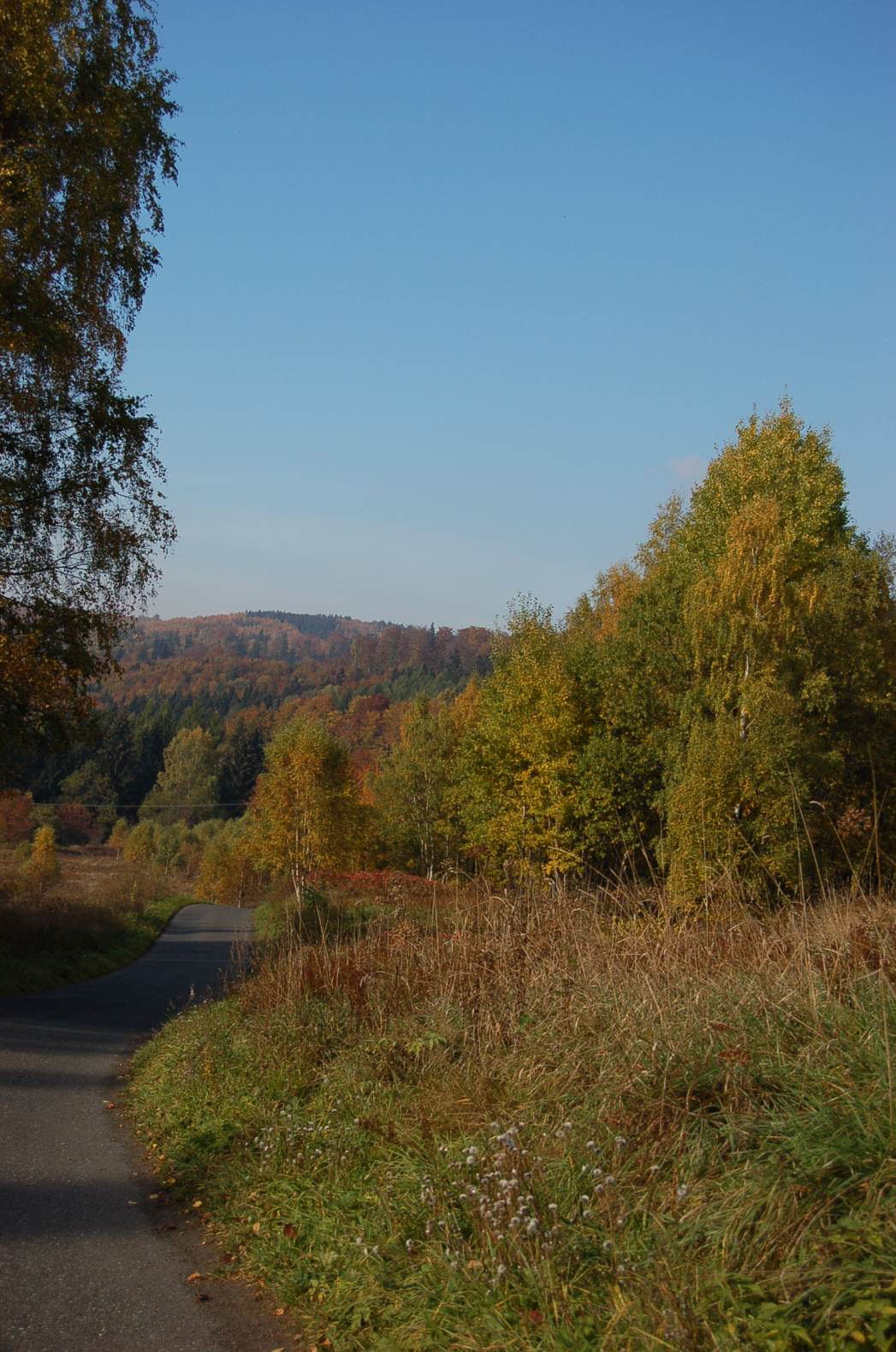 Okolice Osówki w Sudetach